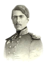 Pedro V, rei de Portugal (1837-1861).